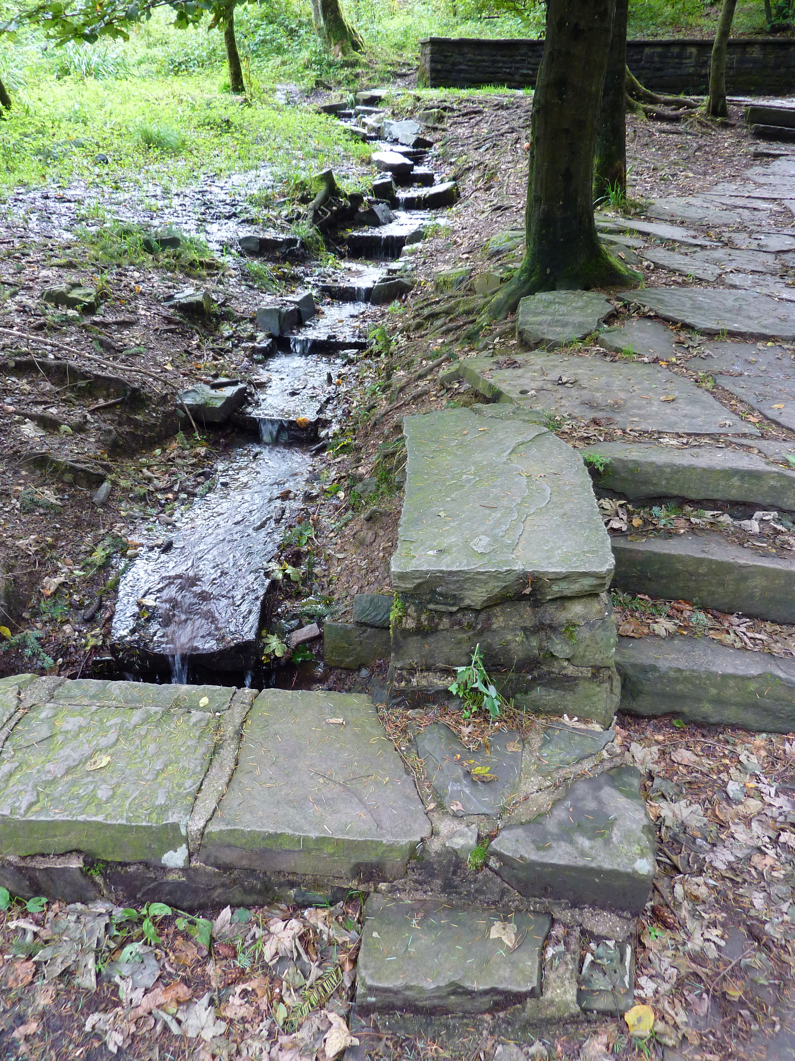 Im Rothaargebirge bei Walpersdorf (Netphen)/Westfalen: Die Quelle der Sieg entspringt am Berg Jägerhain, etwa 3 km nordöstlich des Ortes.